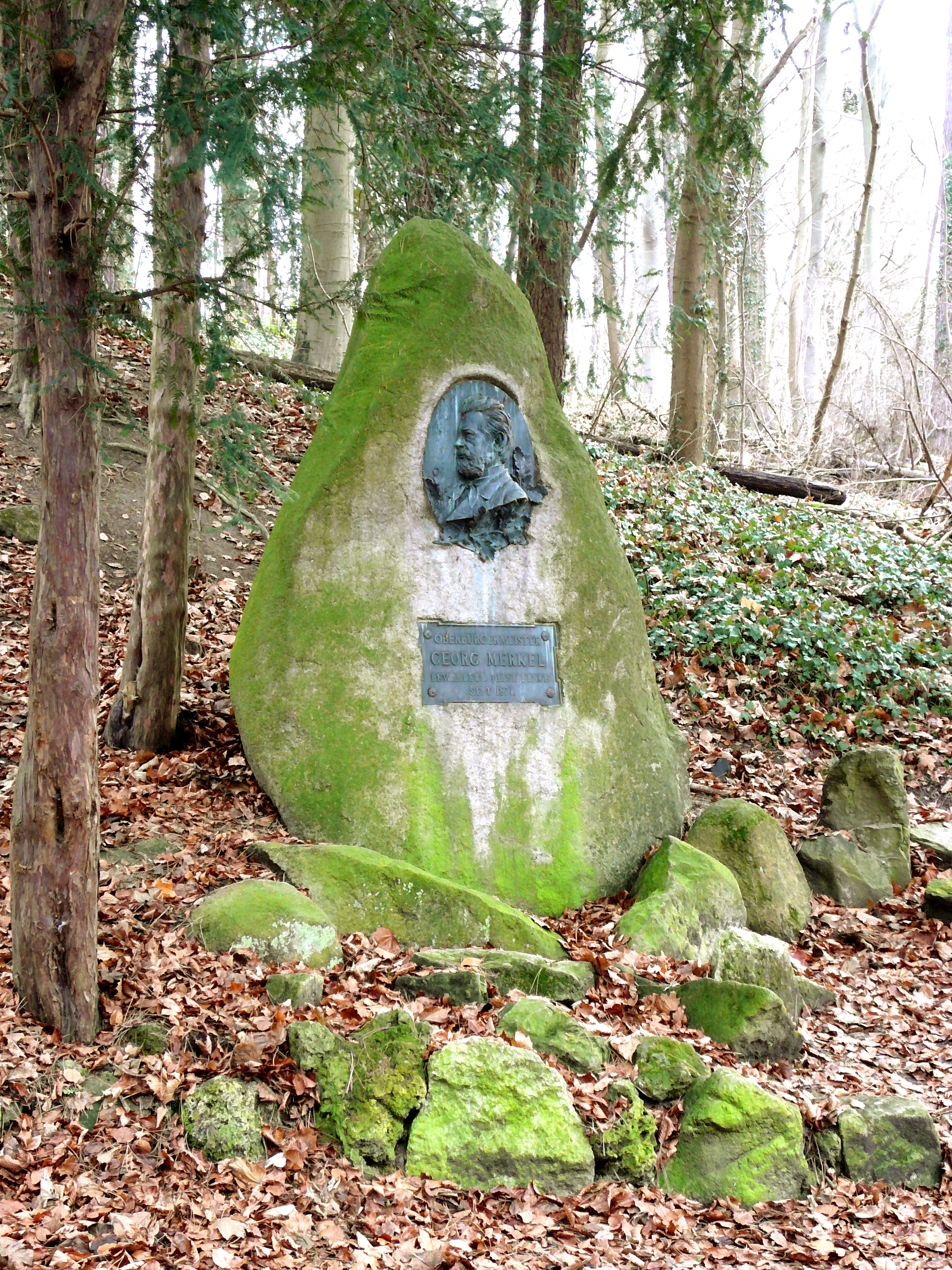 Merkelstein am Hainberg im Göttinger Wald östlich von Göttingen. Zur Erinnerung an die Aufforstung des Hainbergs durch Georg Merkel (1829–1898). Inschrift: OBERBÜRGERMEISTER GEORG MERKEL BEWALDETE DIESE BERGE SEIT 1871